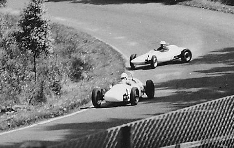 Erstes Formel-V-Rennen auf dem Nürburgring, 10 Runden auf der Start-und-Ziel-Schleife, Südkehre